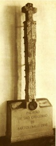 So lyk die kruise van Portugese kalksteen wat Bartolomeu Dias al langs die suidwes- en suidkus van Afrika opgerig het as bakens vir die ryk van die Portugese koning Joao II.